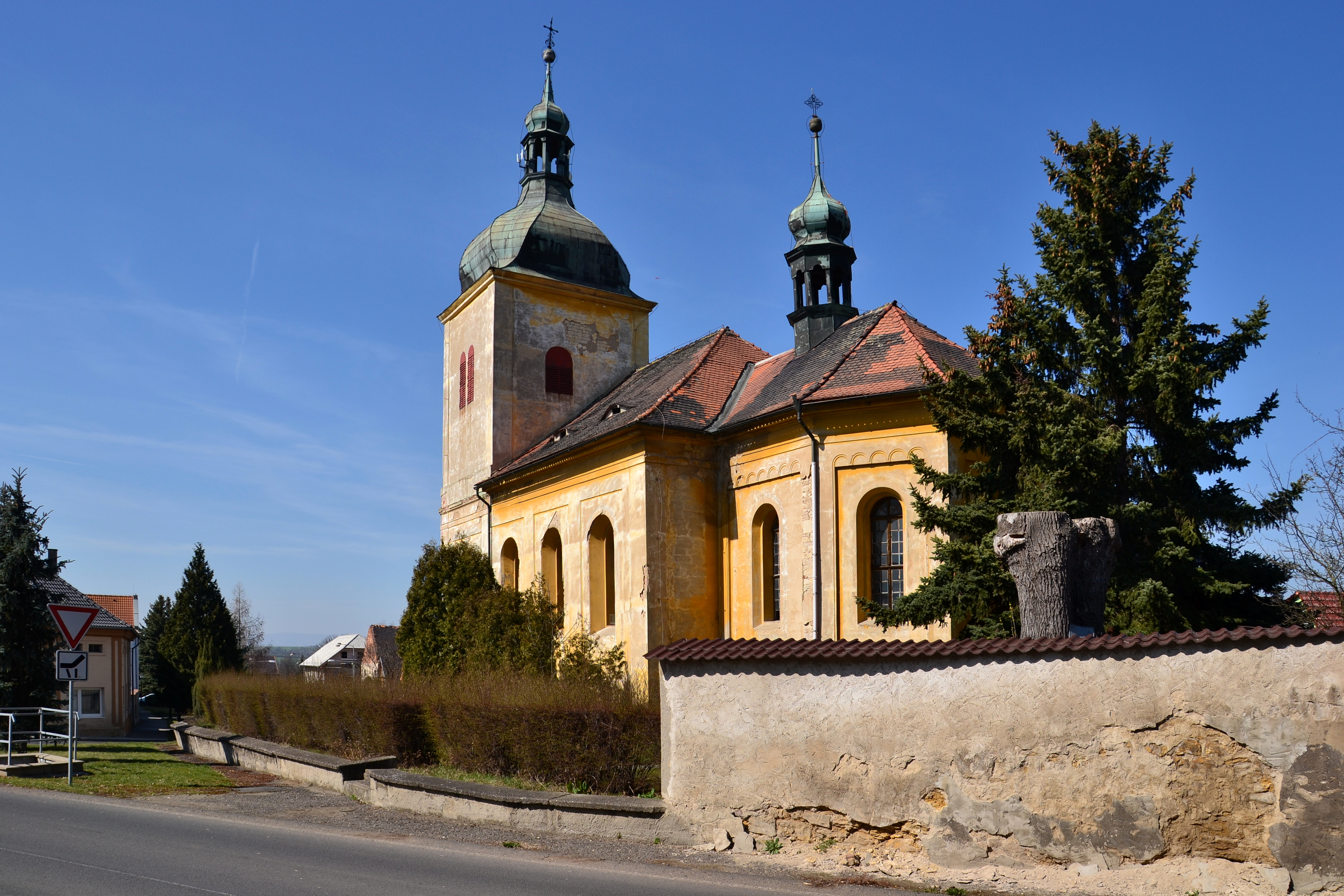 Volevčice – kostel svatého Prokopa z jihovýchodu